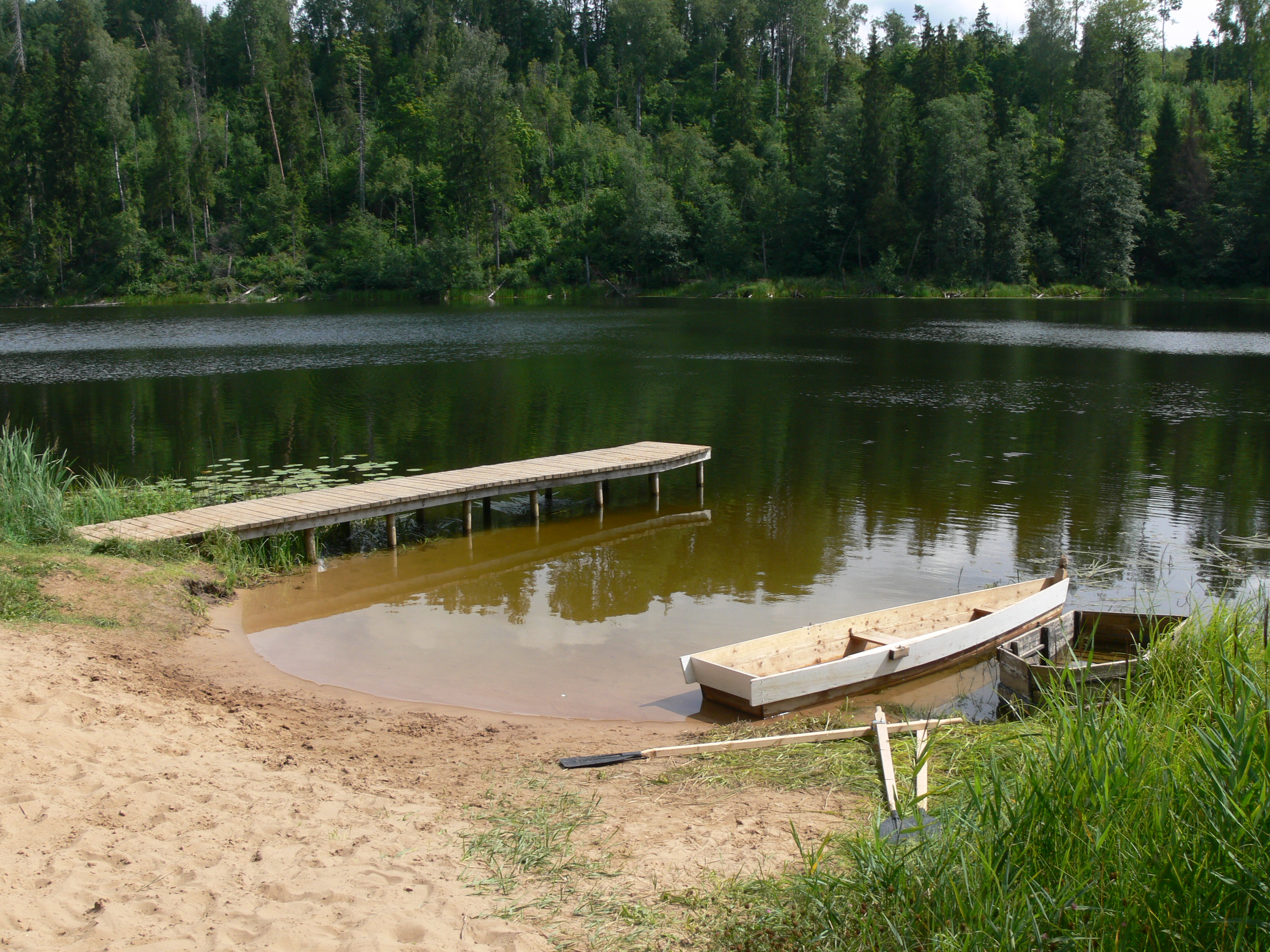 Võru maakond